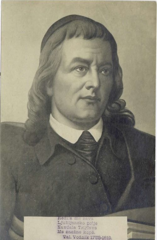 Valentin Vodnik (1758-1819), Slovene poet, linguist and priest.